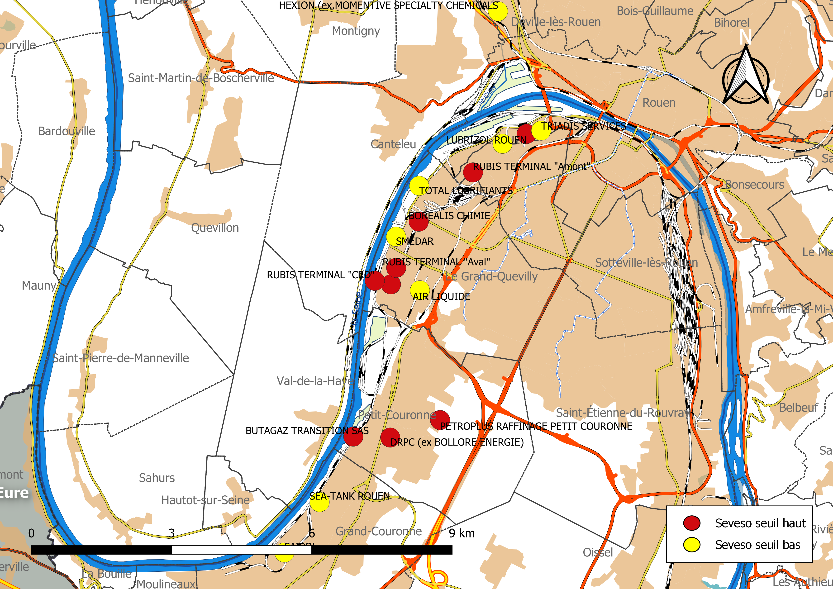 Carte des installations classées pour la protection de l’environnement dans la zone de Rouen. État au 5 octobre 2019.